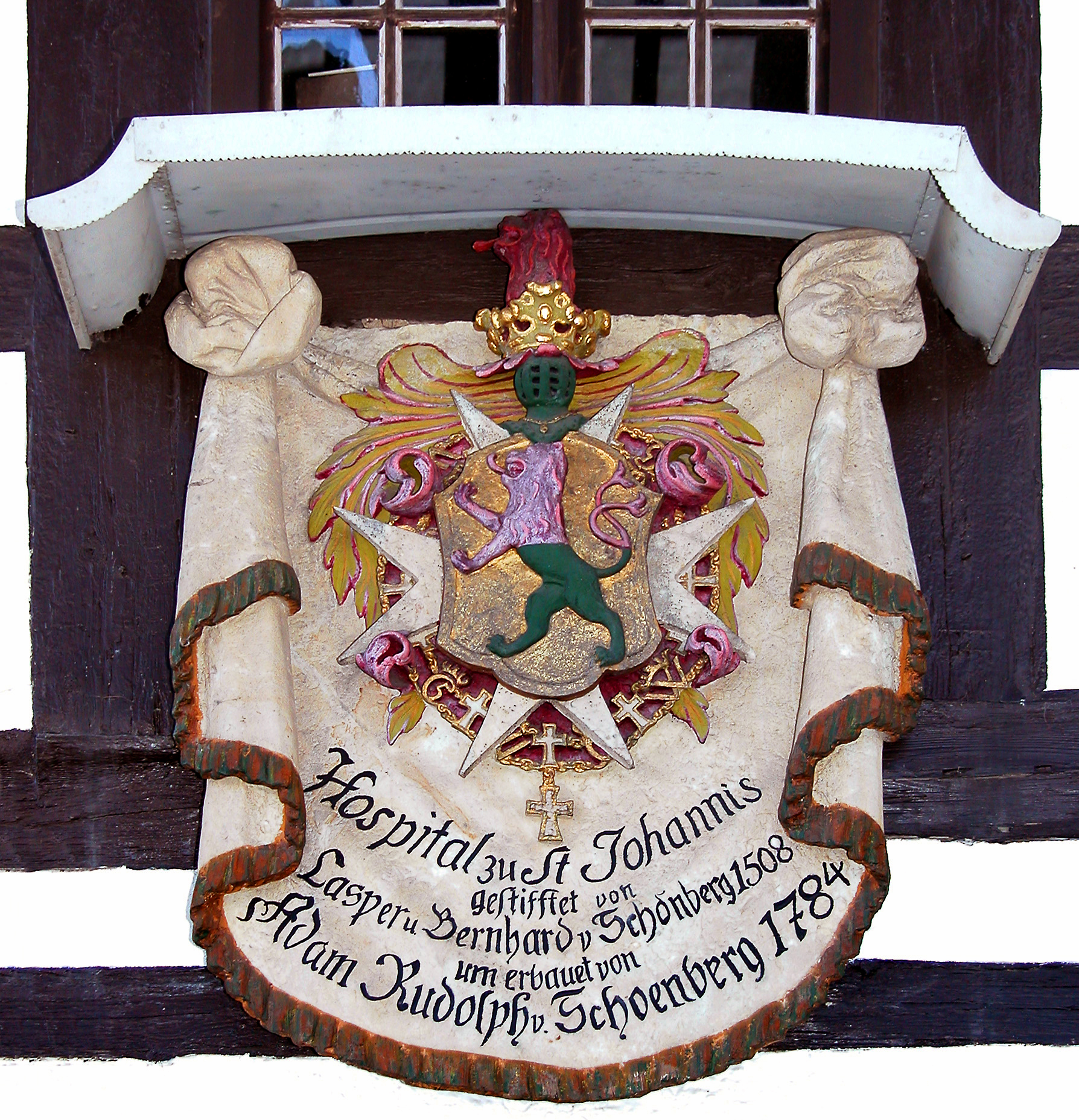 24.09.2006 09619 Sayda, Dresdner Straße 78 (GMP: 50.709973,13.425184): Hospital zu St. Johannis (1784), Barockbau mit Fachwerkobergeschoß und von Schönberg´schem Wappen. [DSCN11732.TIF]20060924370DR.JPG(c)Blobelt